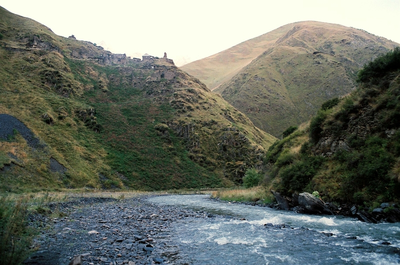 არდოტი. ანდაკისწყალი